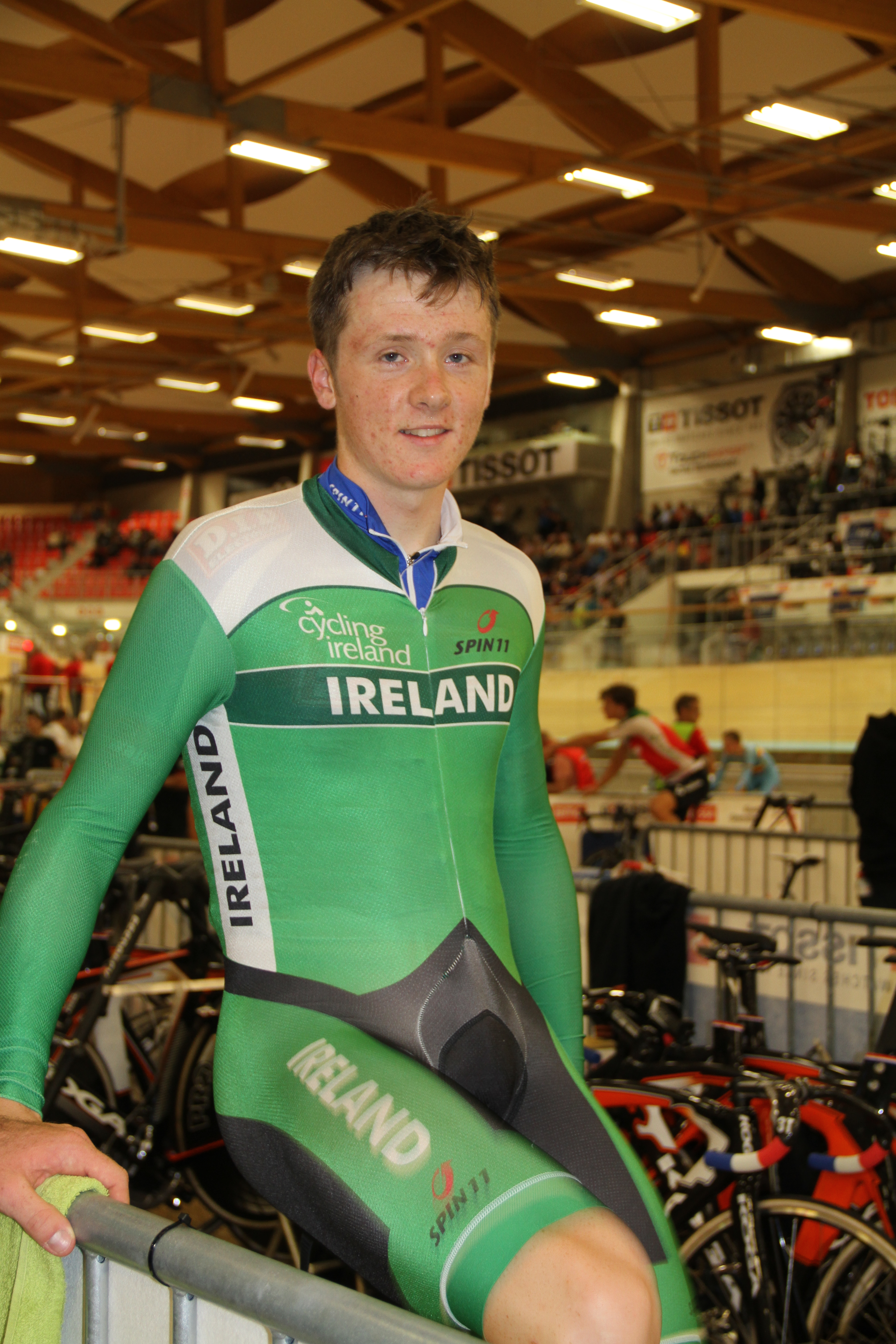 Fintan Ryan, irischer Radsportler The making of this document was supported by the Community-Budget of Wikimedia Germany.